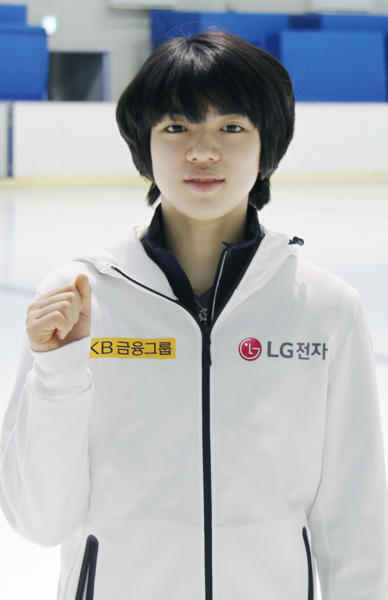 ■ 올해부터 2년간 차준환 선수 공식 후원 및 광고 모델 계약 □ 올해 16세의 남자 피겨스케이팅 최고 기대주 ■ LG전자, 차 선수 가족과는 3대에 걸친 오랜 인연 이어가 □ 높은 성장성과 잠재력은 물론 LG전자와 오랜 인연을 고려해 후원 결정 □ ‘73년부터 2대째 LG전자 가전제품 판매…이번 후원으로 3대에 걸쳐 인연 ■ 동계스포츠 종목에 대한 후원 지속 확대 □ 스켈레톤 종목의 국가대표팀과 윤성빈 선수 각각 후원 □ 지난해 얼음정수기냉장고 광고 모델로 여자 아이스하키 국가대표팀 기용 ■ 한국영업본부장 최상규 사장 “최고를 향해 도전하는 국가대표 선수들이 훈련에 보다 집중해 꾸준히 성장할 수 있도록 관심을 갖고 지원하겠다”고 강조 ※ Social LG전자 ( 에서 관련 보도자료를 확인하실 수 있습니다.